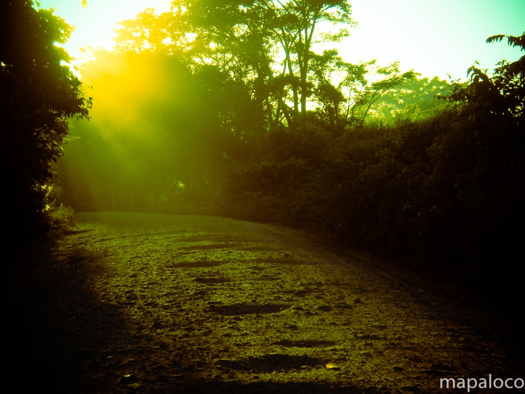 Carretera Siuna-Rosita.